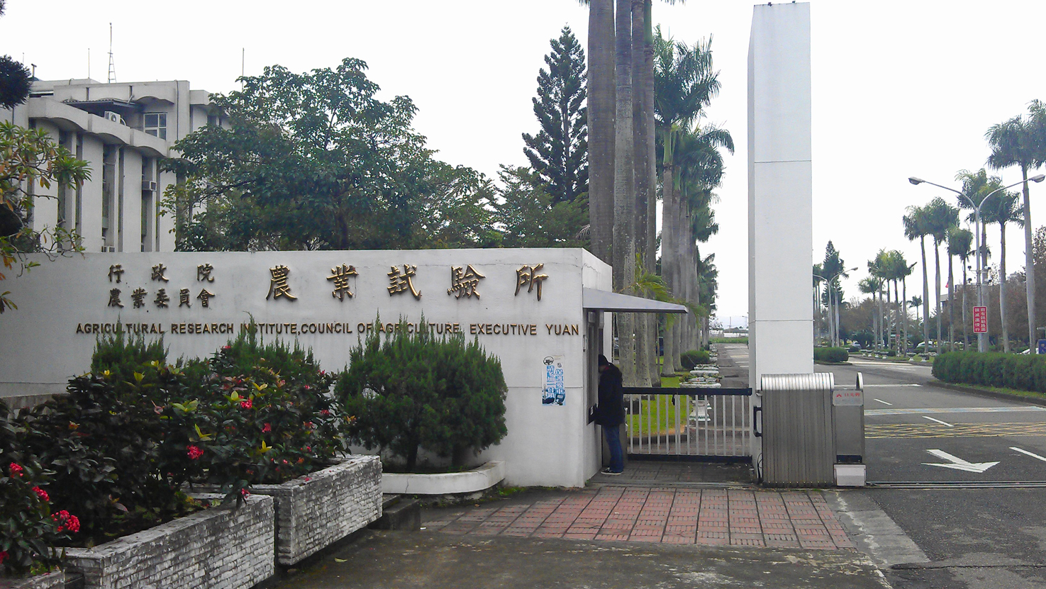 農試所大門